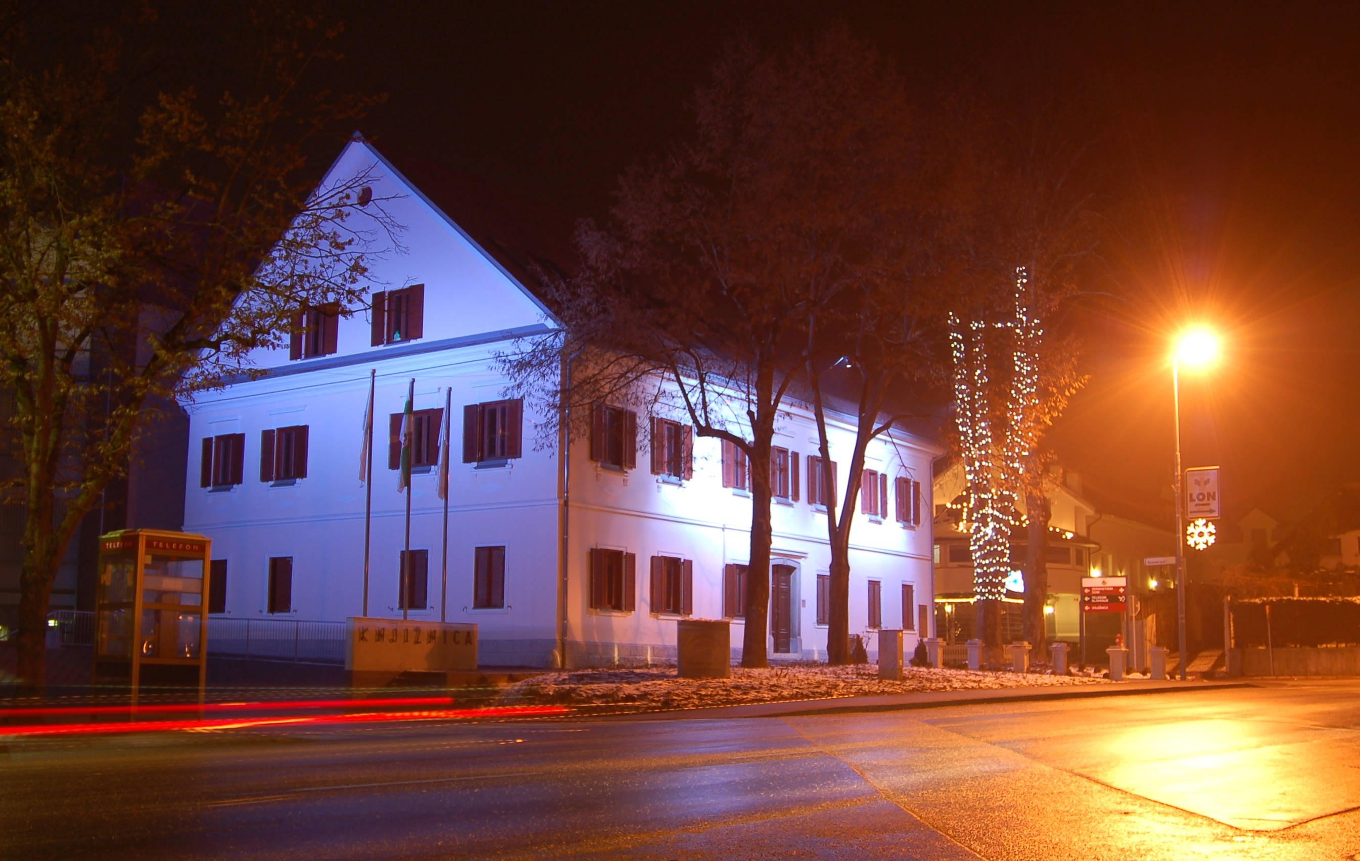 Pročelje knjižnice Grosuplje.